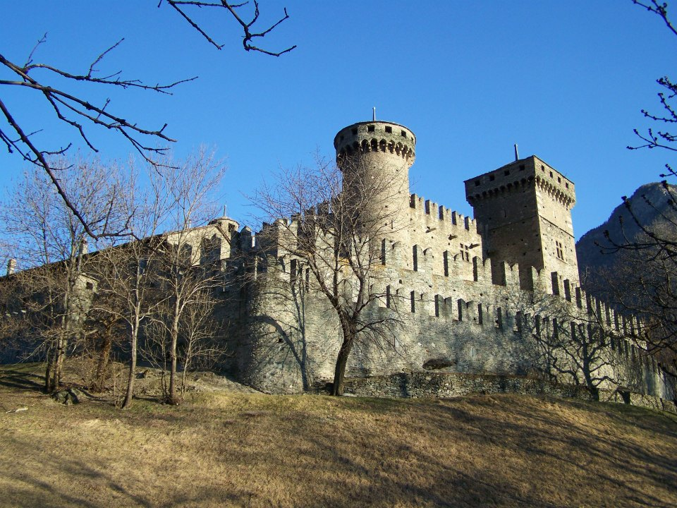 Castello di fenis This is a photo of a monument which is part of cultural heritage of Italy.